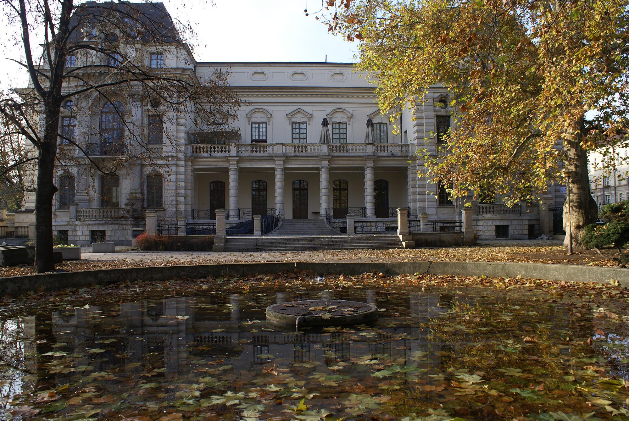 Wrocław, resursa kupiecka, 1892-1909